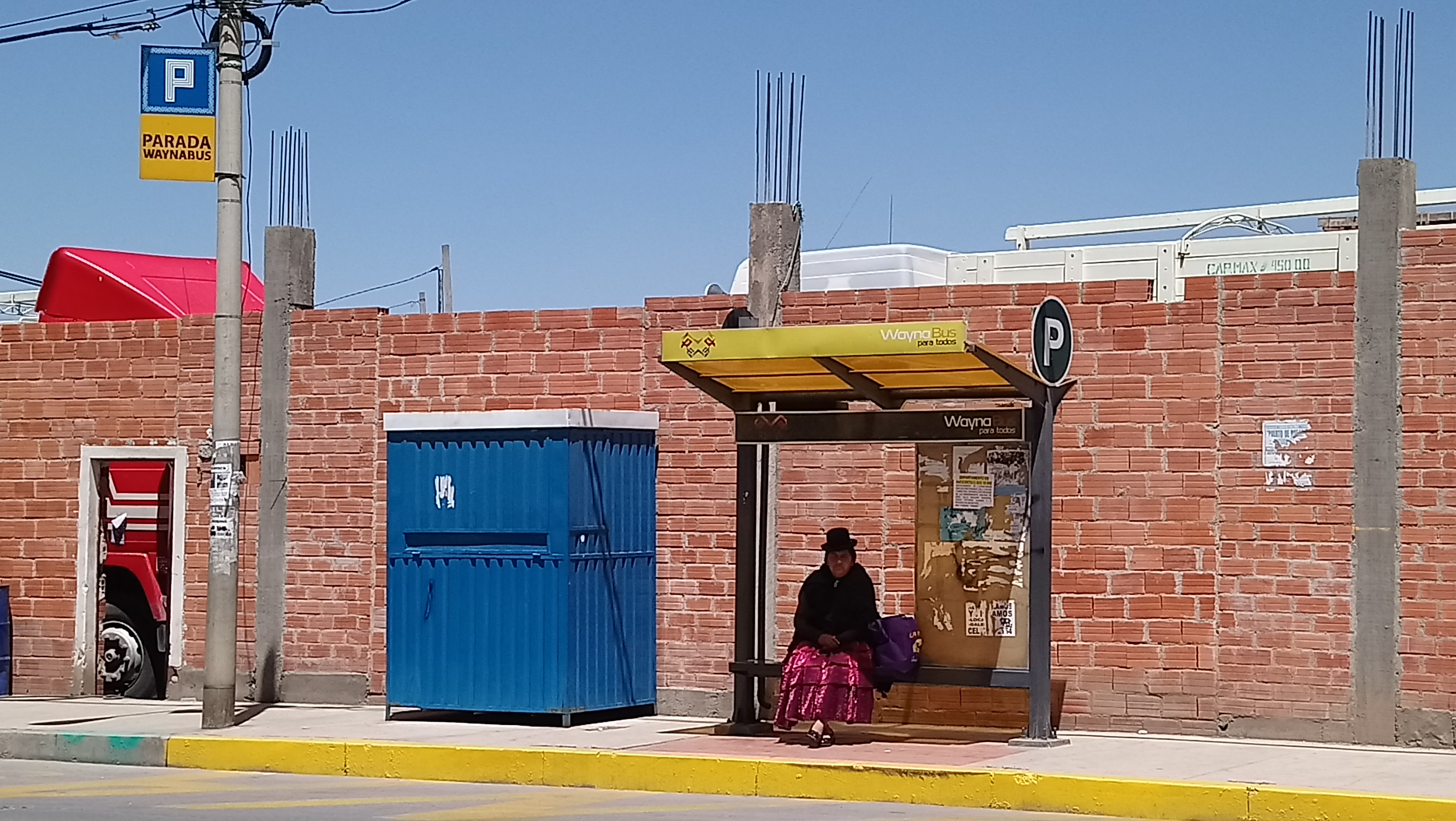 Parada con refugio Wayna Bus El Alto